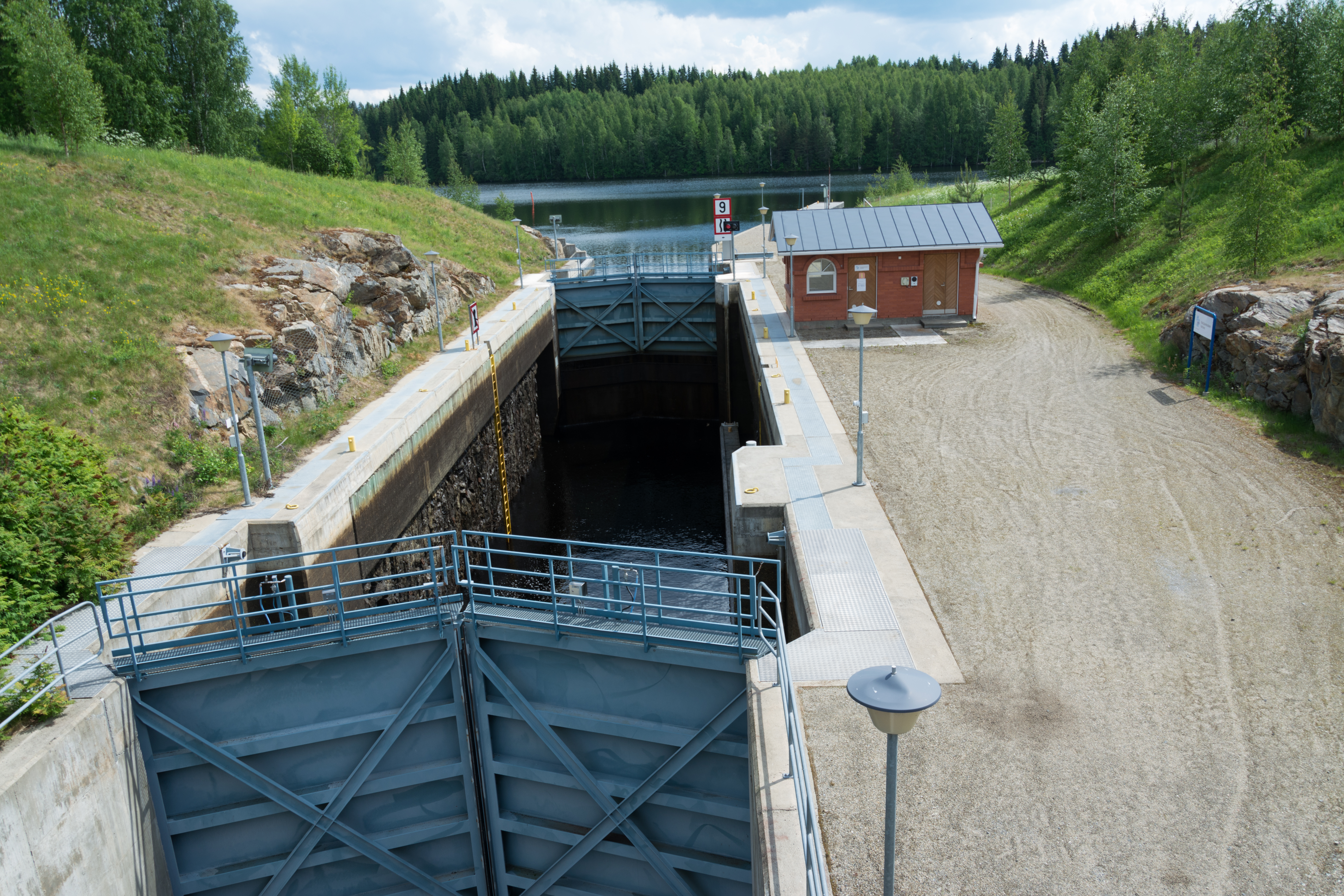 Karjalankosken kanava Juankoskella